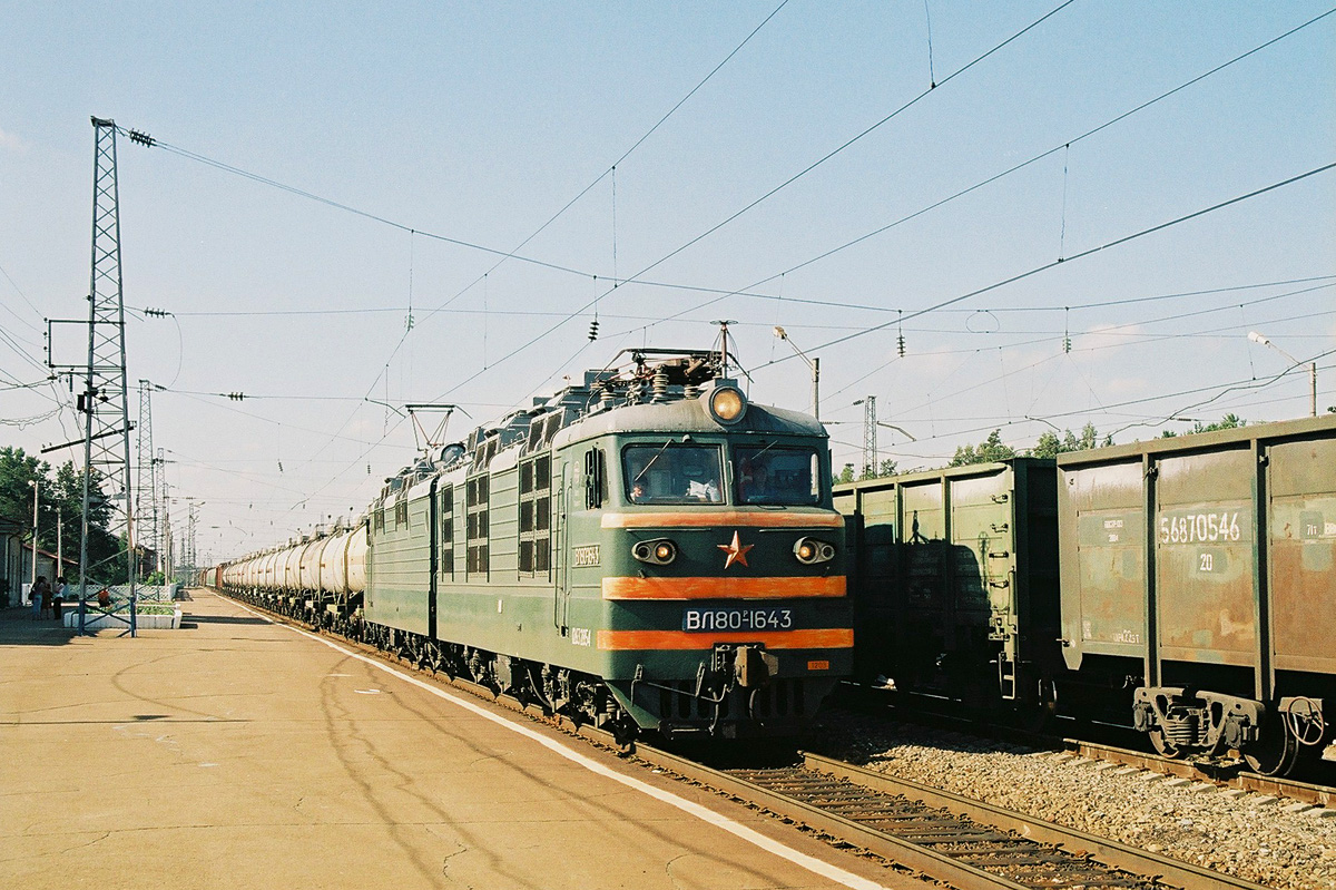 Электровоз ВЛ80Р-1643 Россия, Иркутская область, станция Ангарск